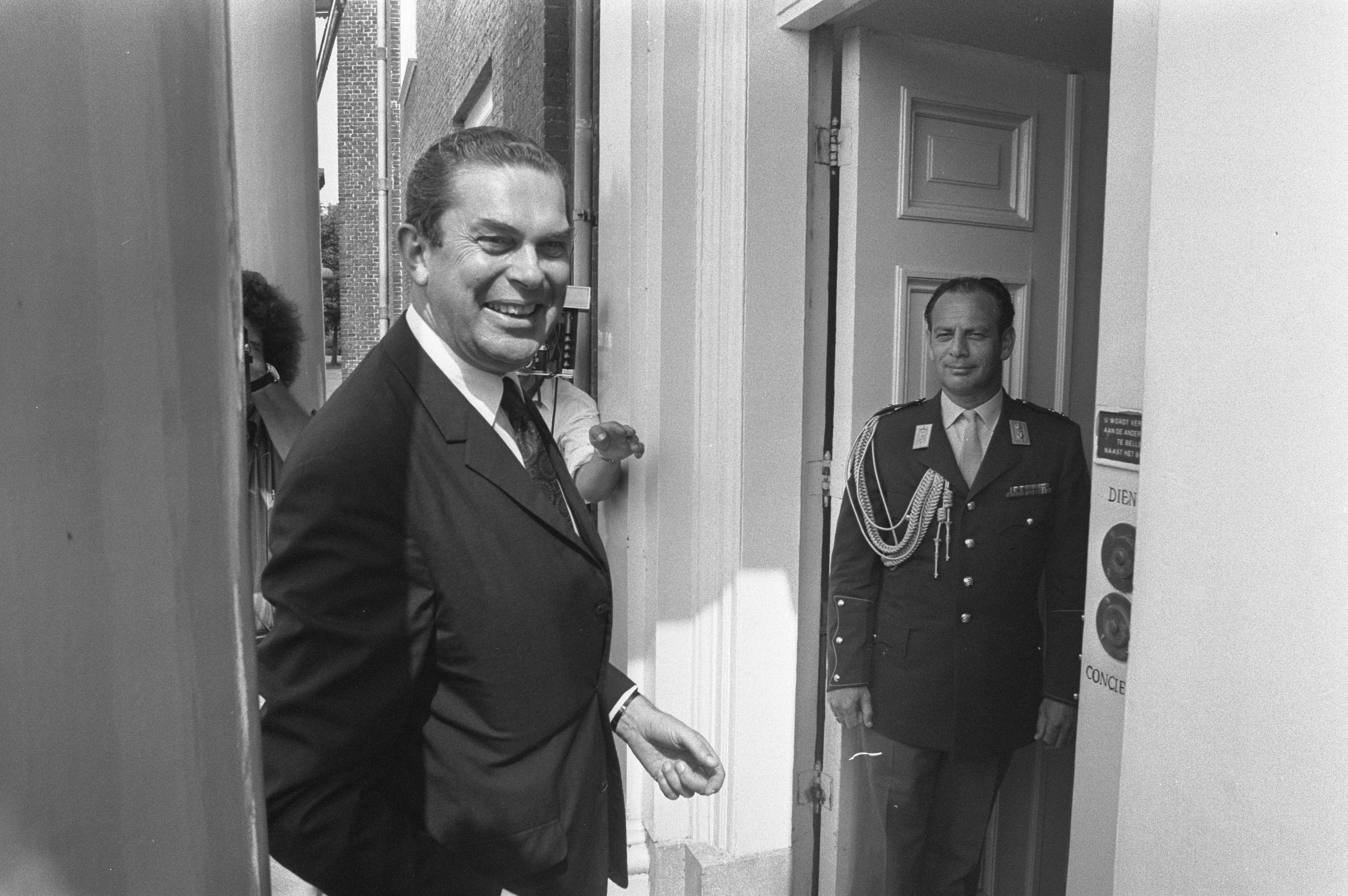 Collectie / Archief : Fotocollectie Anefo Reportage / Serie : [ onbekend ] Beschrijving : Premier Biesheuvel wordt ontvangen door koningin Juliana op Huis ten Bosch in Den Haag in verband met de kabinetscrisis Datum : 19 juli 1972 Locatie : Den Haag, Zuid-Holland Trefwoorden : ministers-presidenten, politiek, regeringscrises Persoonsnaam : Biesheuvel, Barend Fotograaf : Verhoeff, Bert / Anefo Auteursrechthebbende : Nationaal Archief Materiaalsoort : Negatief (zwart/wit) Nummer archiefinventaris : bekijk toegang 2.24.01.05 Bestanddeelnummer : 925-7511